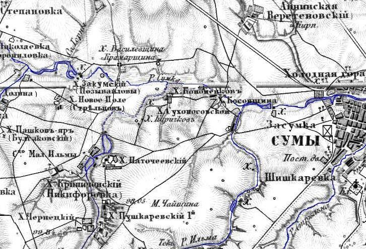 Косовщина на карте 19 века.